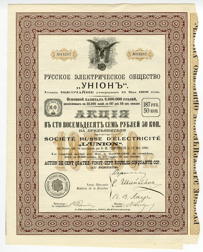 Акция в 187,5 руб. на предъявителя Русского электрического общества "Унион" с основным капиталом в 6 млн. руб. С.-Петербург, 1900 г.